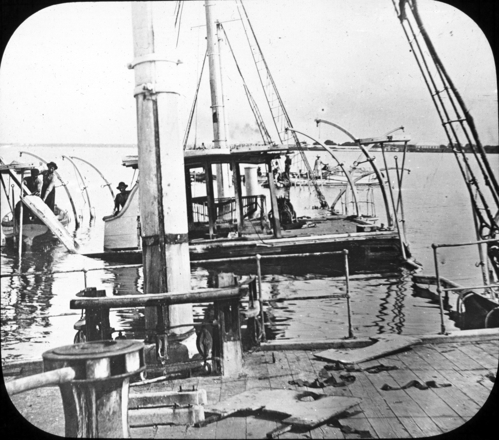 Scene, deck Don Antonio de Ulloa